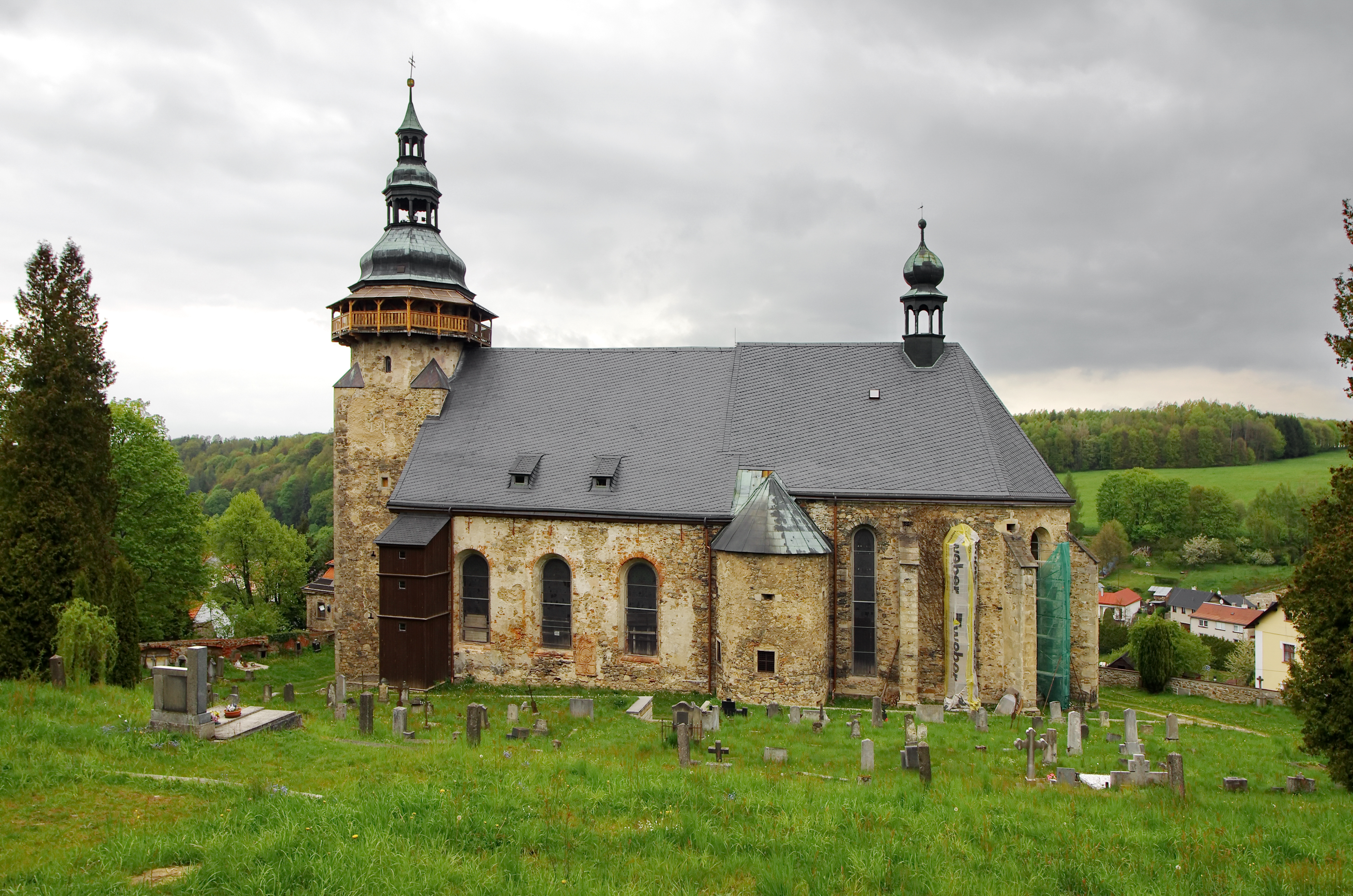 Kostel svatého Jiří, Kostelní, Horní Slavkov, Horní Slavkov.